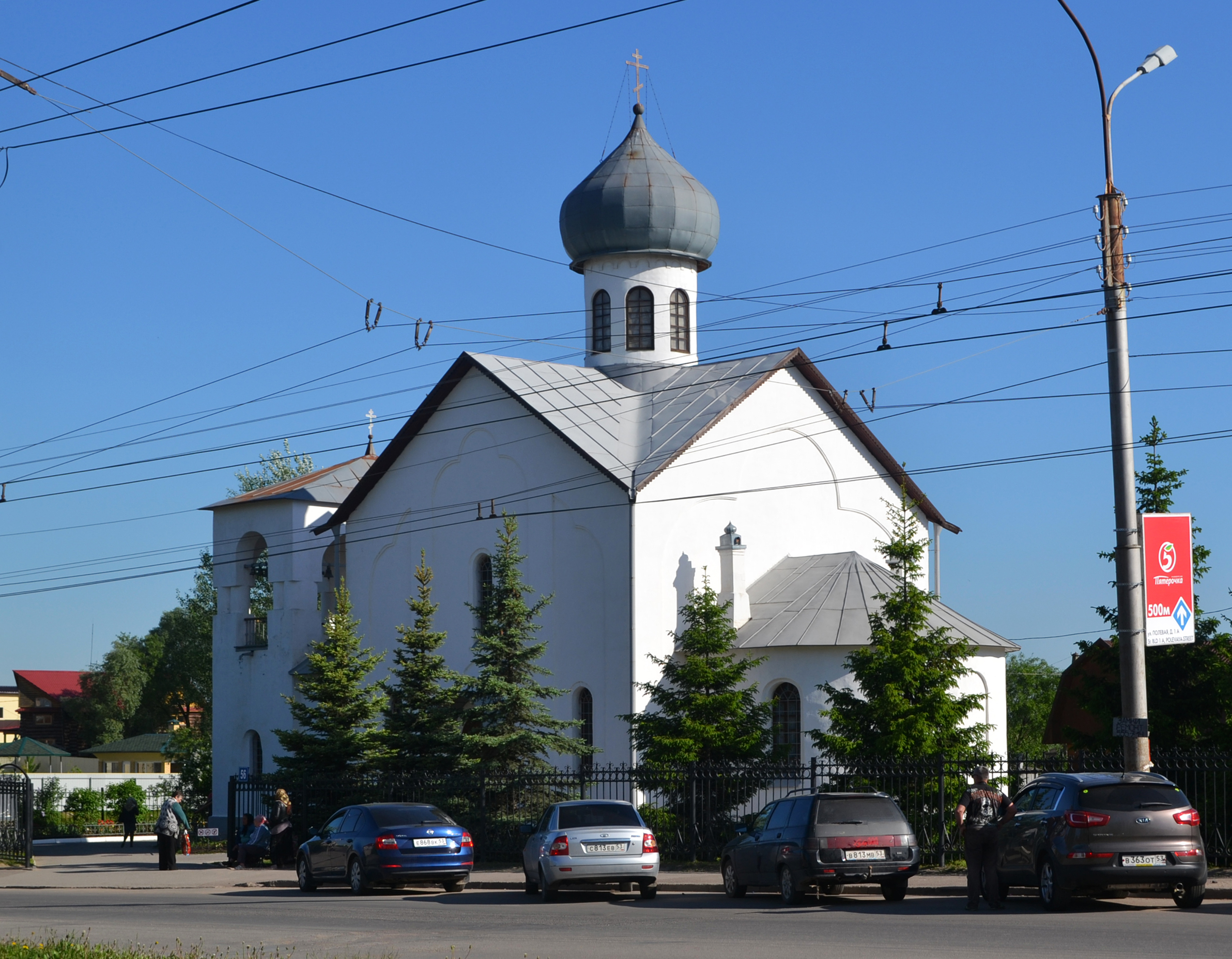 Церковь Александра Невского в Великом Новгороде